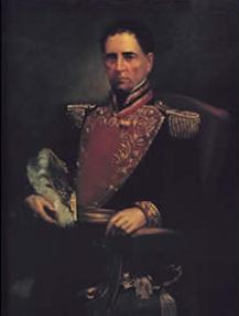 Portratit of José Tadeo Monagas.